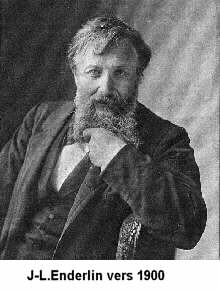 Portrait de J-L. Enderlin en 1900